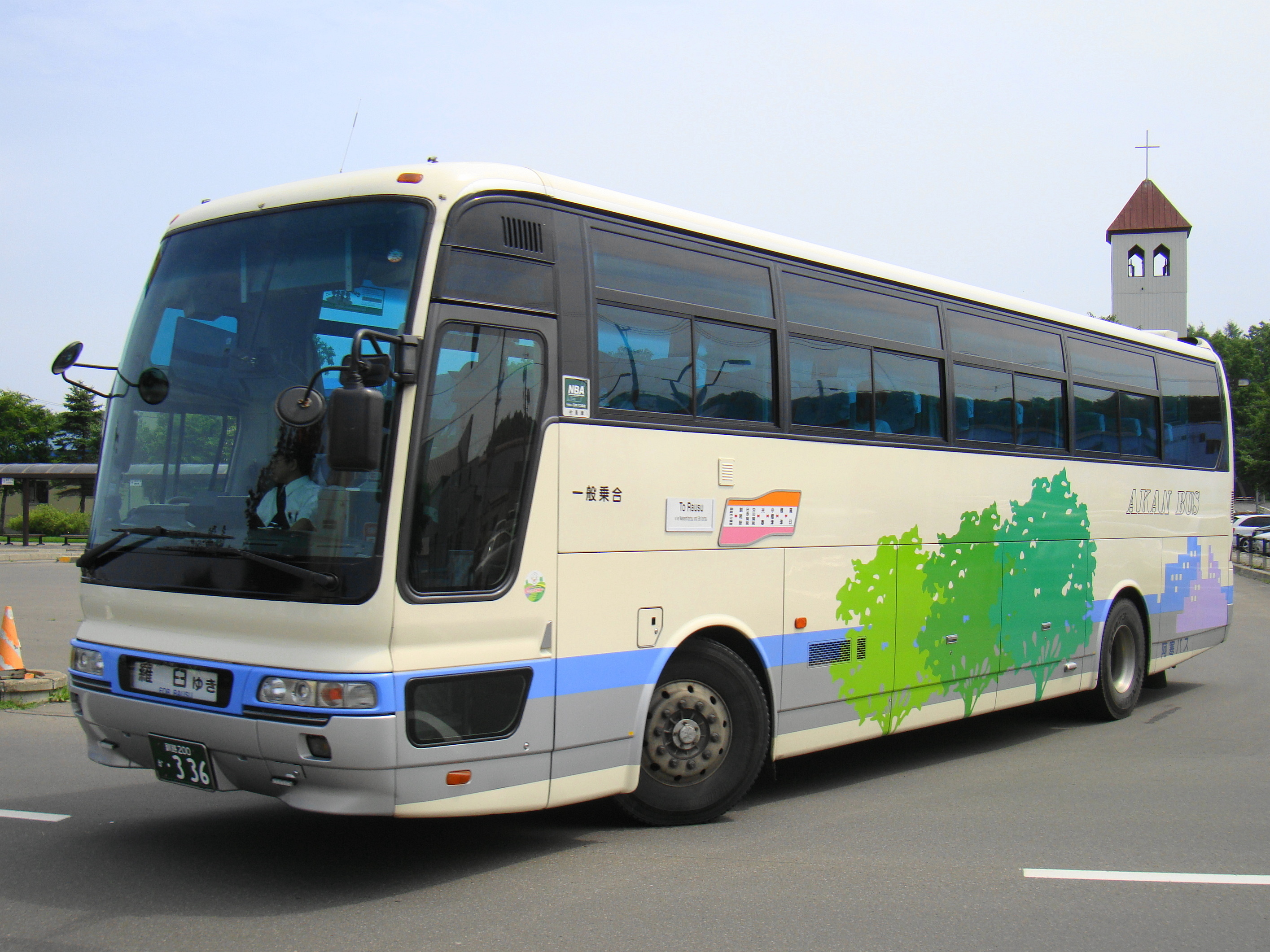 Kushiro to Rausu